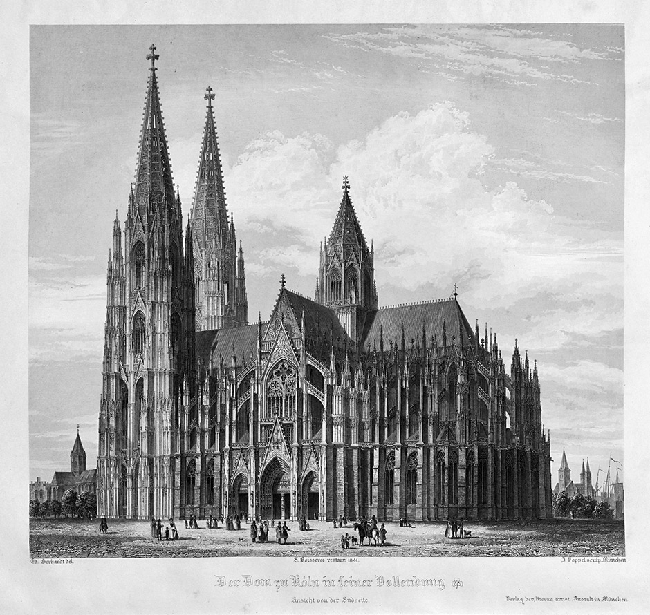 "Der Dom zu Köln in seiner Vollendung - Ansicht von der Südseite" aus Solpiz Boisserée: Geschichte und Beschreibung des Doms von Köln. Zweite umgearbeitete Ausgabe. München 1842.